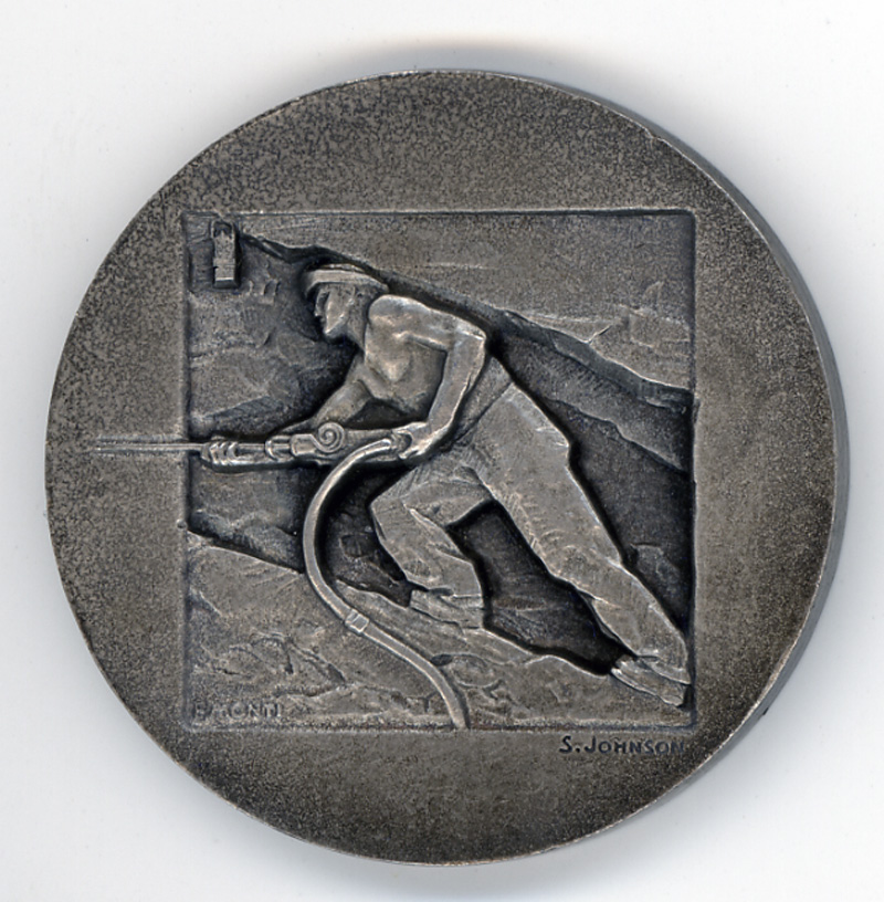 Médaille (verso) inogurant le centenaire des mines de montevecchio en sardaigne, donné au mineurs de cette mines. Je suis l'auteur de l'image. (médaille de mon grand père)